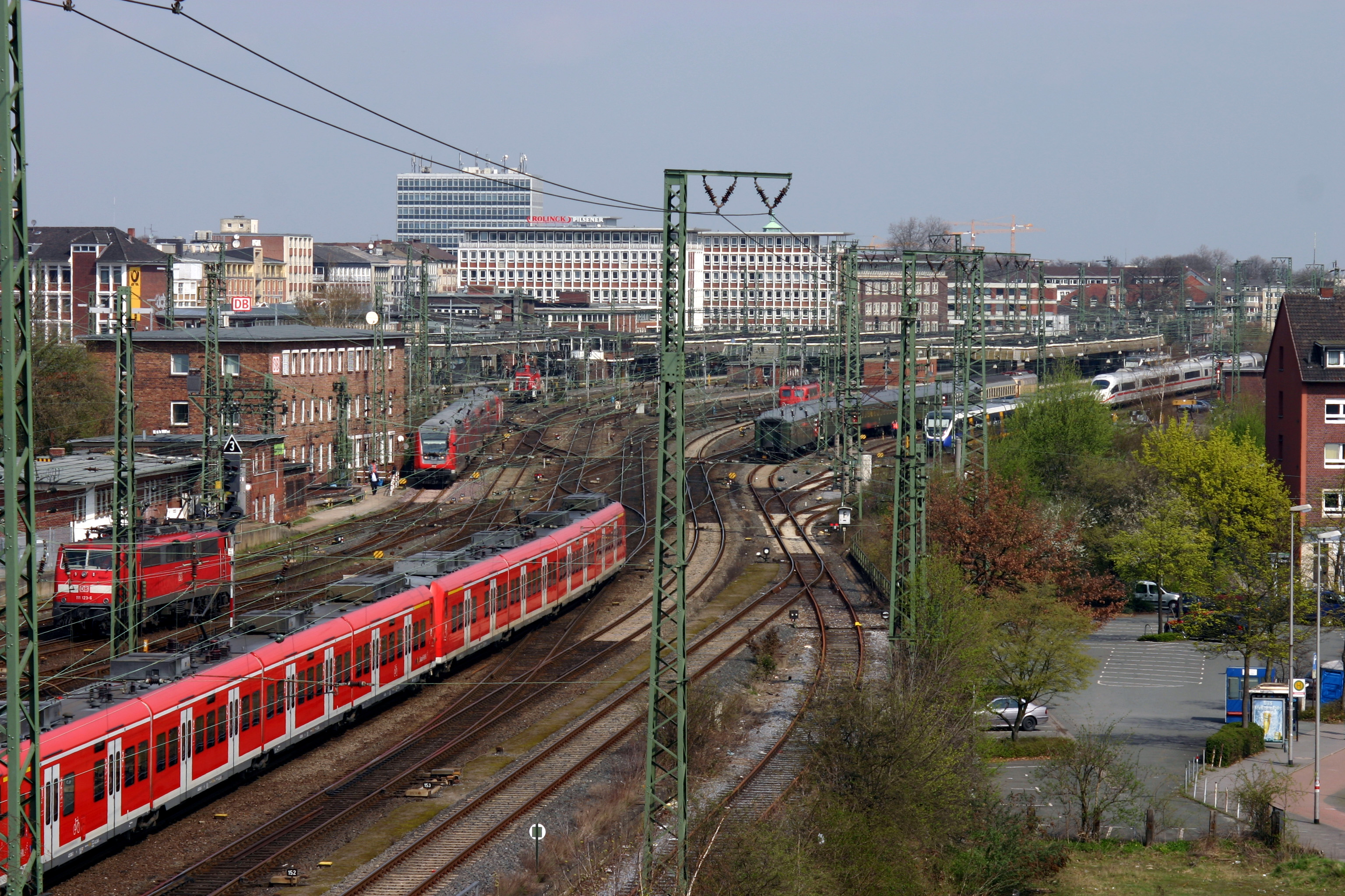 Gleisvorfeld - Münster (Westfalen) Hauptbahnhof